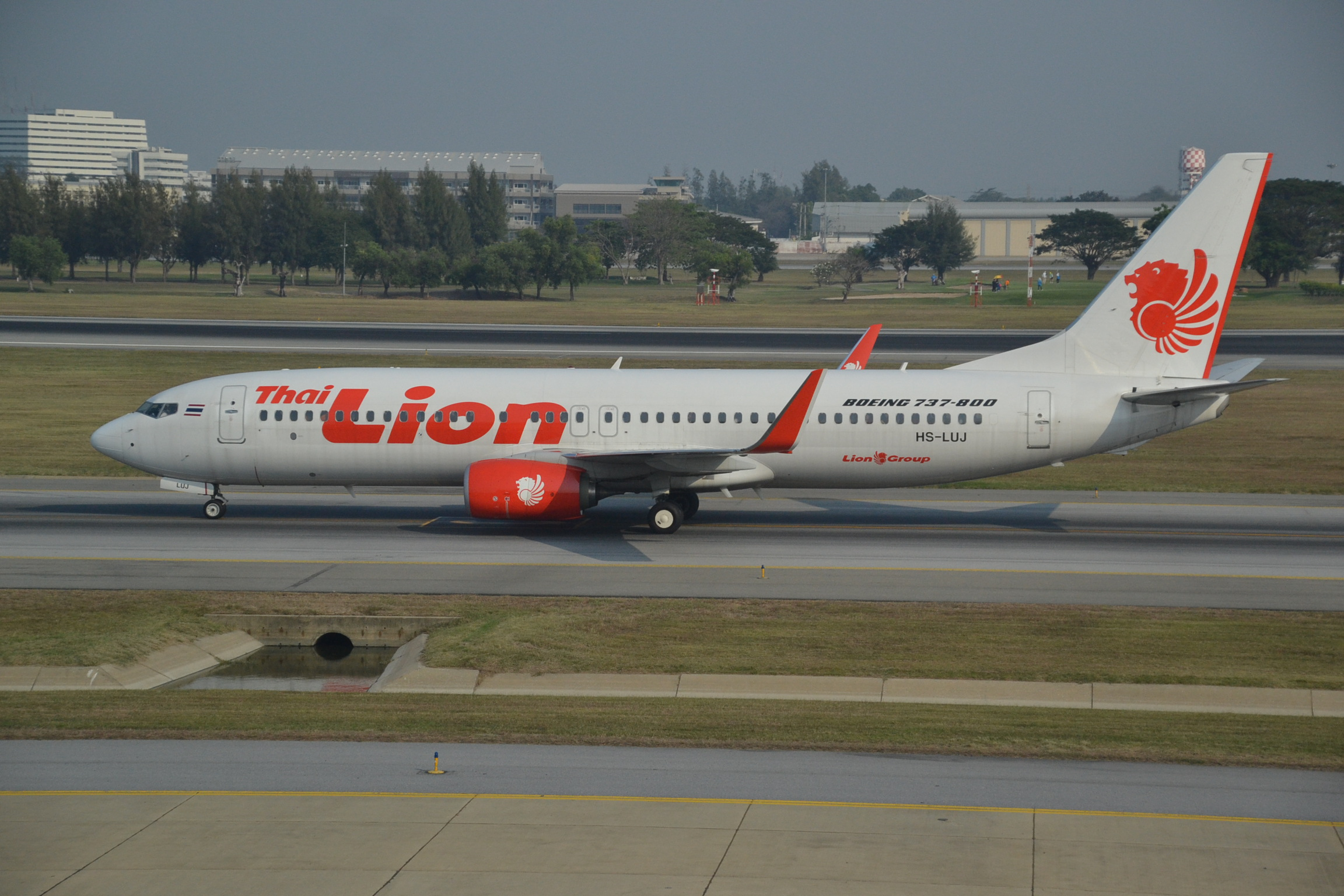 Boeing 737/8 of Thai Lion Air at Bangkok-DMK, 02/03/16.